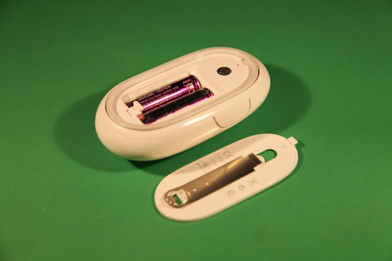 Mighty Mouse